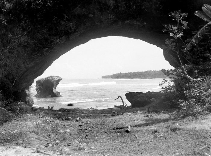 Negatief. Karang Bolong